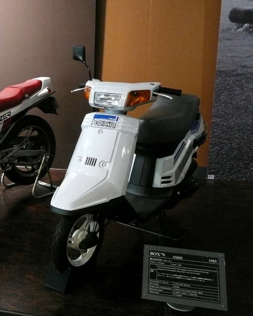 ヤマハ・BOX'N CQ50E 1985年 ヤマハコミュニケーションプラザにて撮影